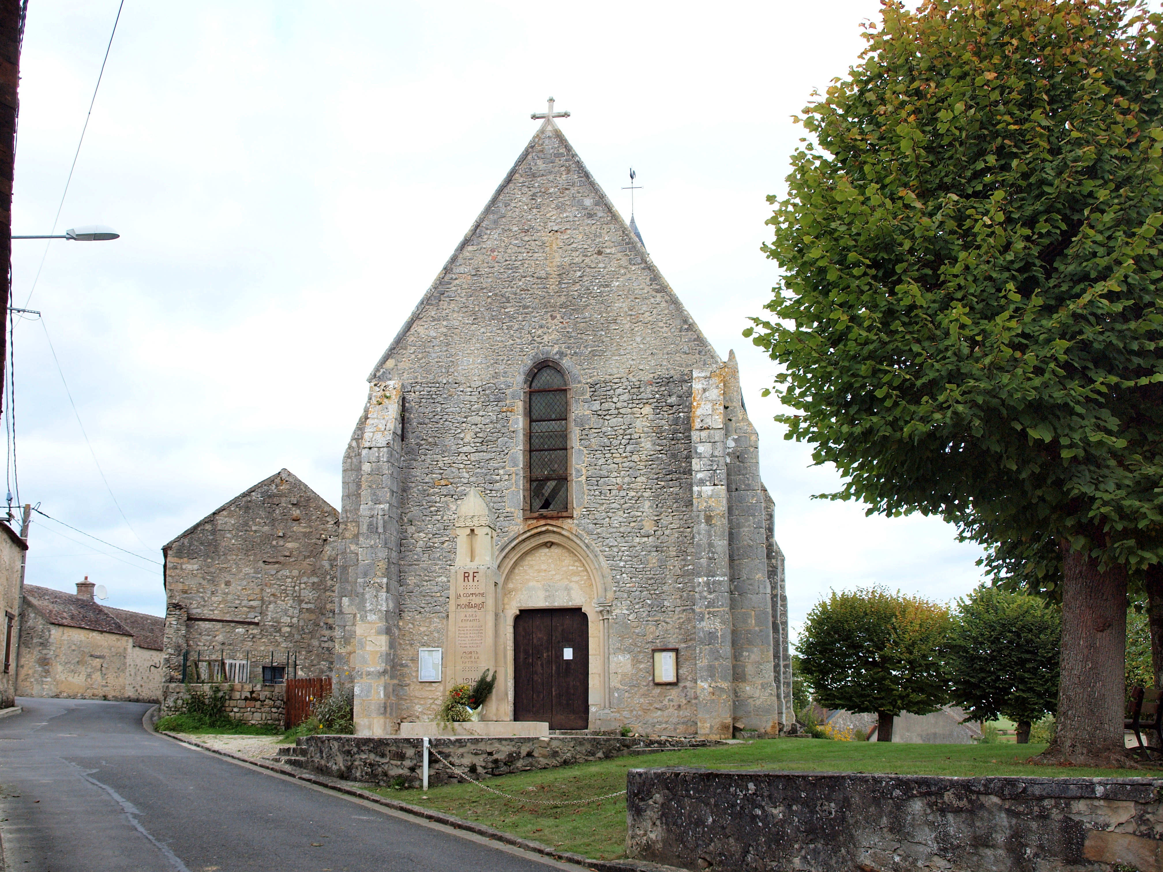 Église Saint-Mammès de Montarlot (Seine-et-Marne, France)